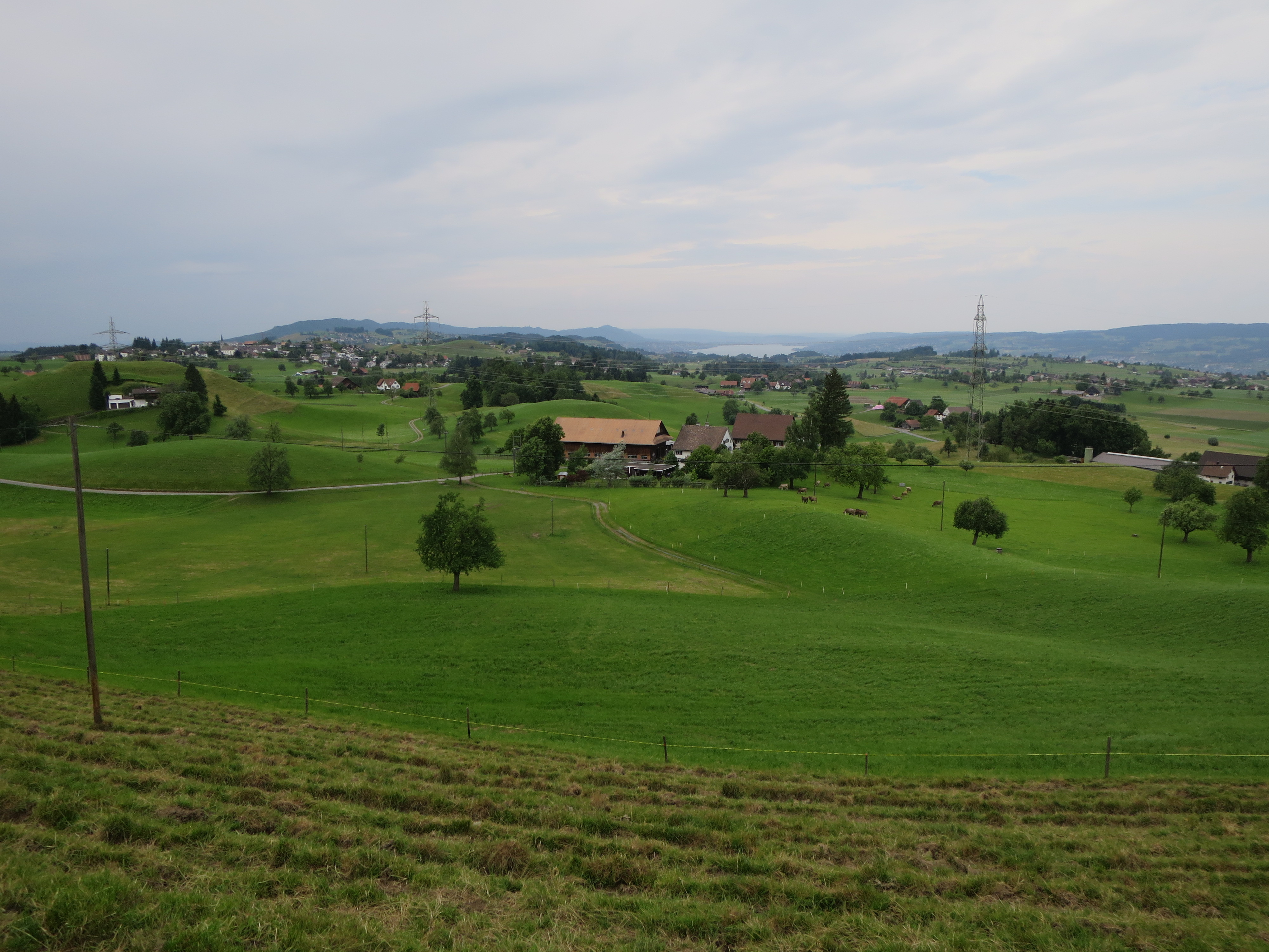 Blick von unterhalb der Laubegg auf Schönenberg und den Zürichsee